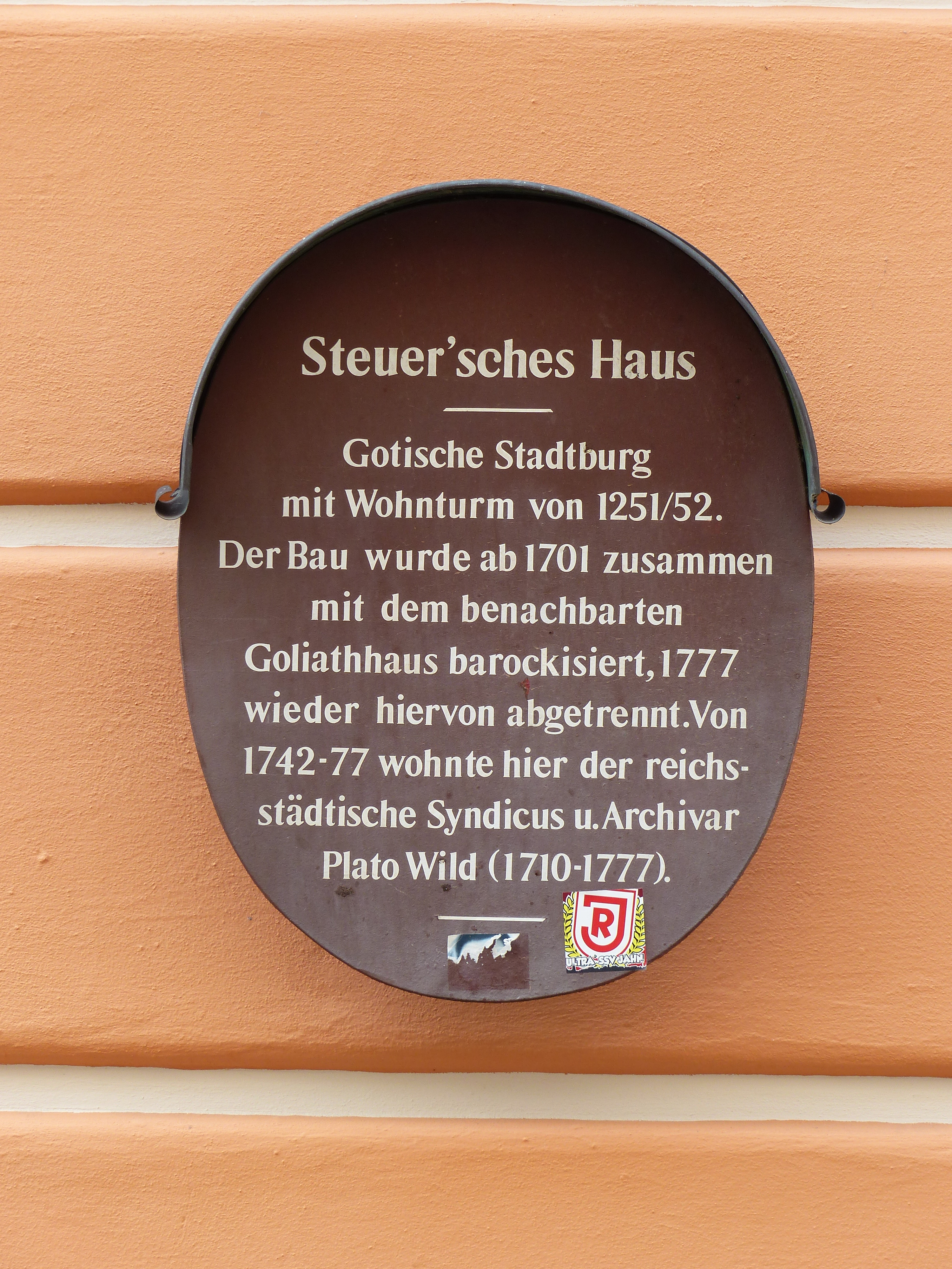 Infotafel, Steuer'sches Haus, Watmarkt 7, RegensburgThis is a photograph of an architectural monument.